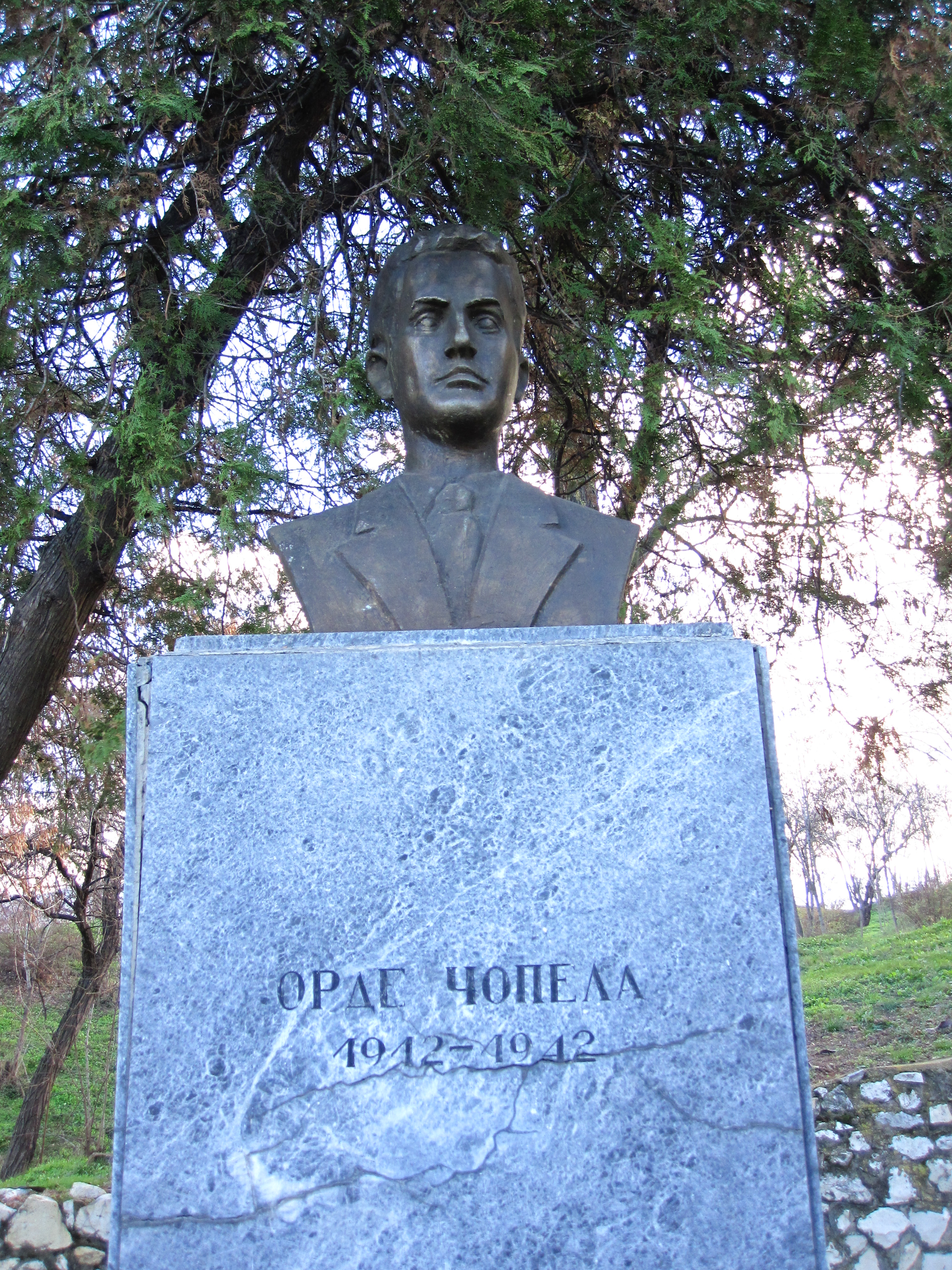 Биста - Орде Чопела - Прилеп